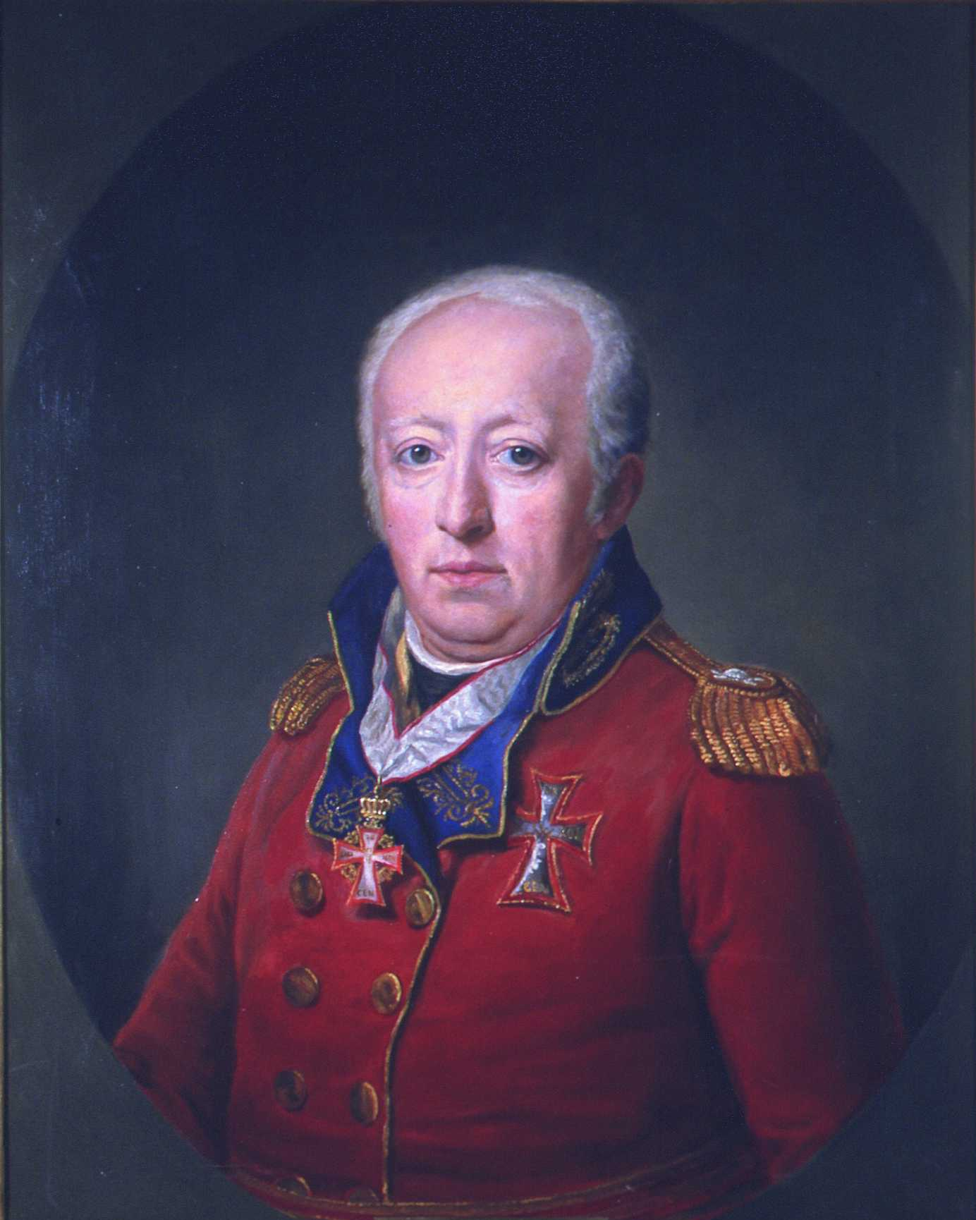 Portrett av statsråd Haxthausen. Rød uniform m/blå krave og epåletter i gull. Dannebrogsorden. Haxthausen, Fredrik Gottschalch. Fra Selskapet til Eidsvoldsbygningens Udstyr. Selskapet ble opprettet 1895 og nedlagt i 1918, og samlet inn gjenstander og inventar til Eidsvollsbygningen til grunnlovsjubileet i 1914. Haxthausen deltok på notabelmøtet 16.feb 1814